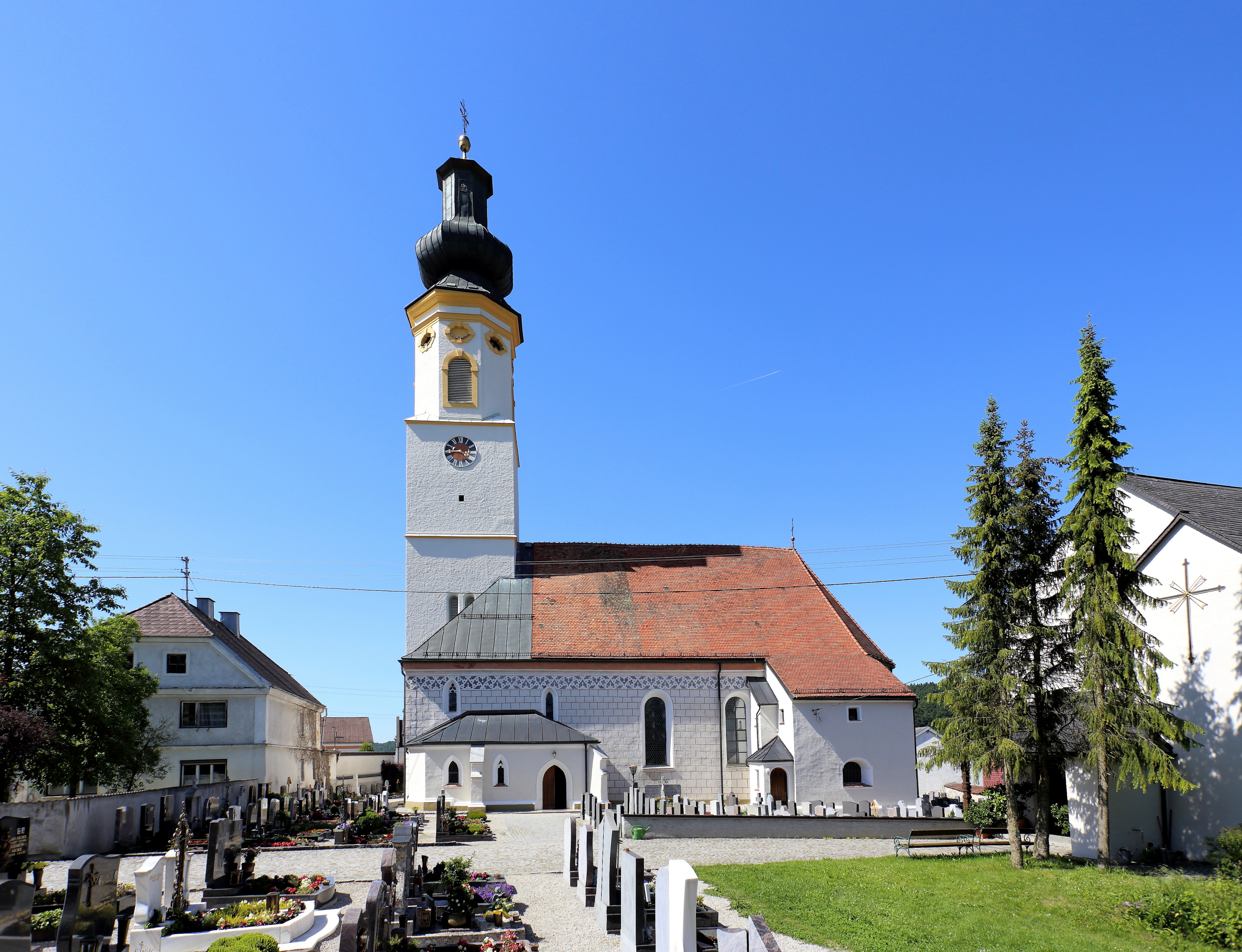 Südansicht der katholischen Pfarrkirche Mariä Himmelfahrt in der oberösterreichischen Gemeinde Pischelsdorf am Engelbach. Ein geschichtlich bedeutender Bau aus den Jahren 1392 bis 1419 mit einem dreischiffigen Langhaus. Dem Westturm wurde eine barocke Glockenstube und ein Zwiebelhelm aufgesetzt.